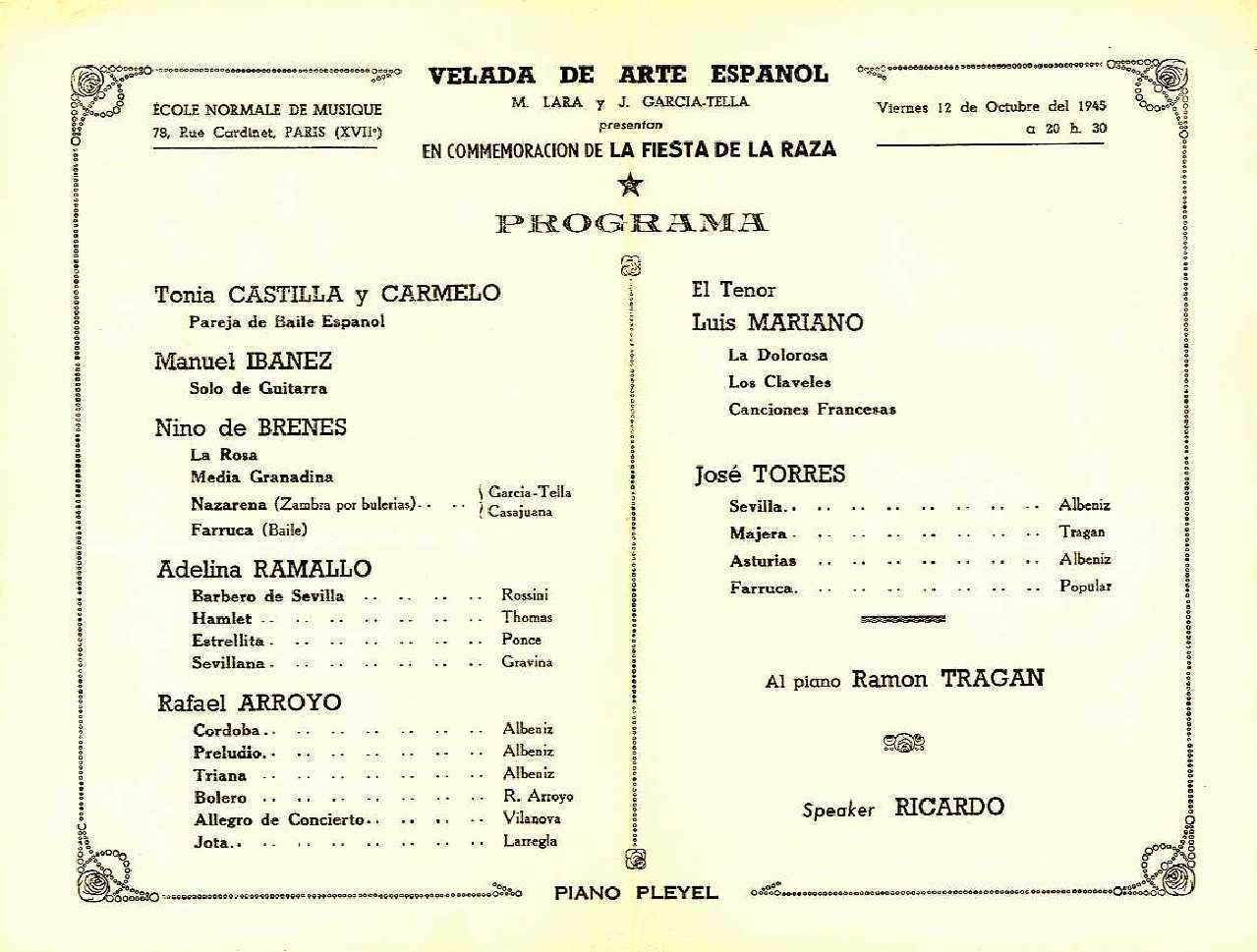 programme d'un spectacle artistique organisé par la revue Galeria (page intérieure)